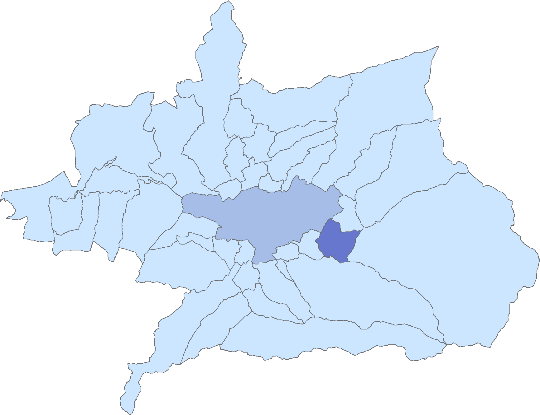 Situación del municipio de Pinos Genil respecto a la comarca de la Vega de Granada, en España.